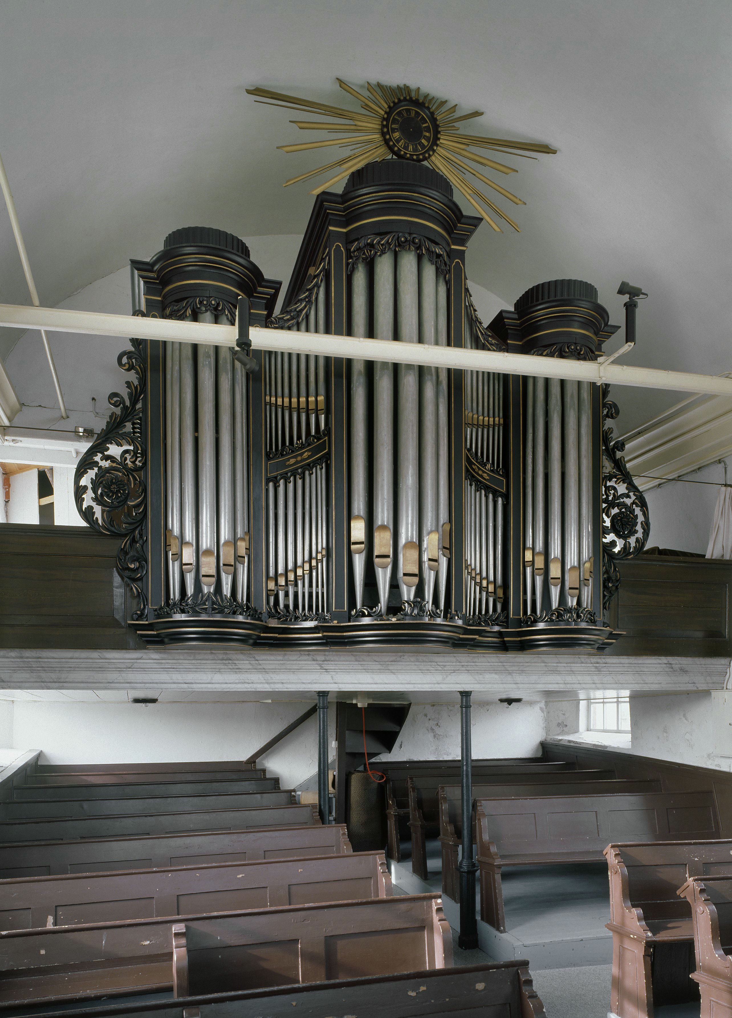 Nederlands Hervormde Kerk: Interieur, aanzicht orgel, orgelnummer 1094 (opmerking: Gefotografeerd voor Het Historische Orgel in Nederland 1865-1872)